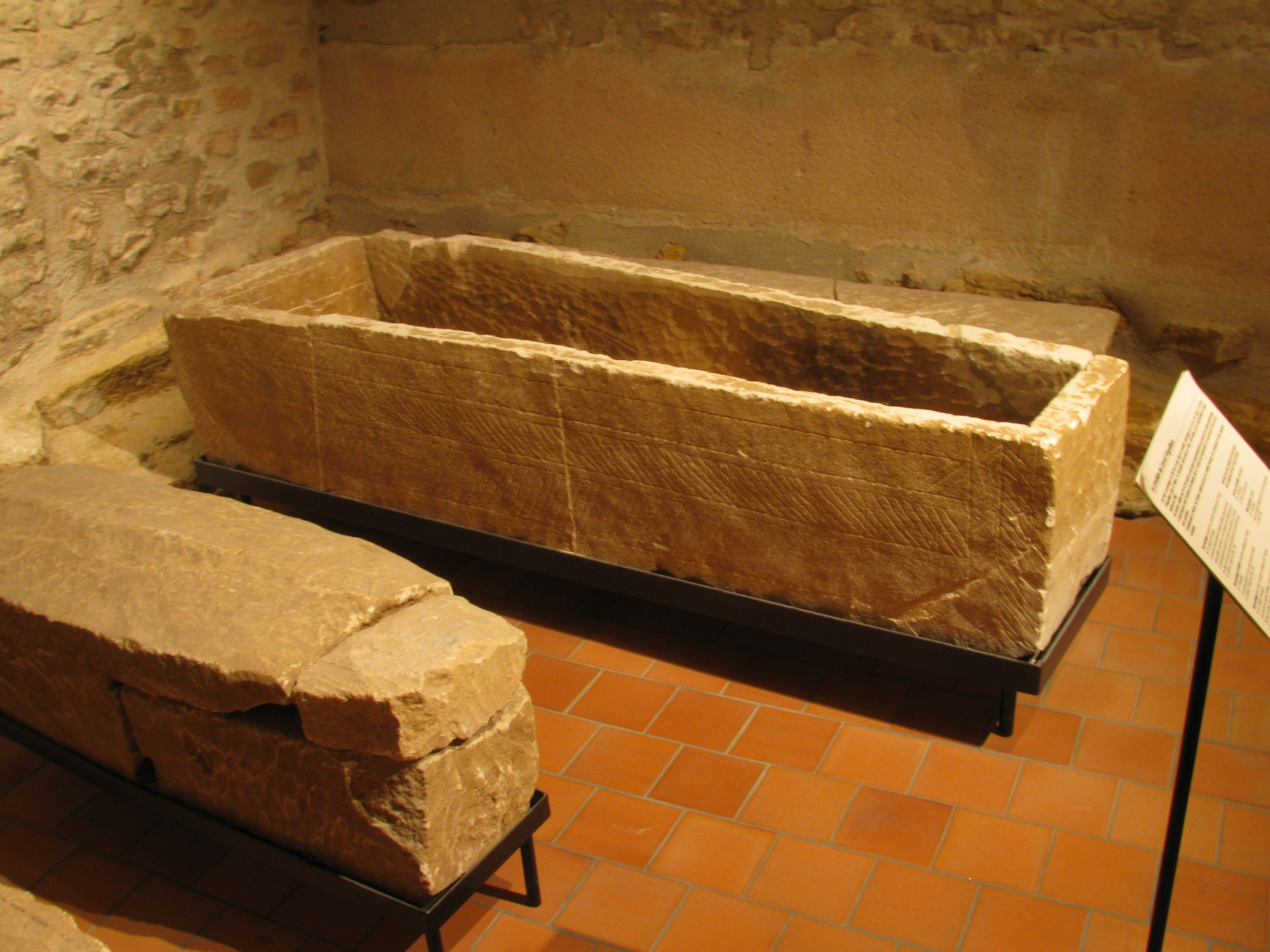 Sarcophages provenant d'une nécropole mérovingienne à Corvol-l'Orgueilleux, Nièvre, France. Exposés au musée Romain-Rolland de Clamey, Nièvre, France.